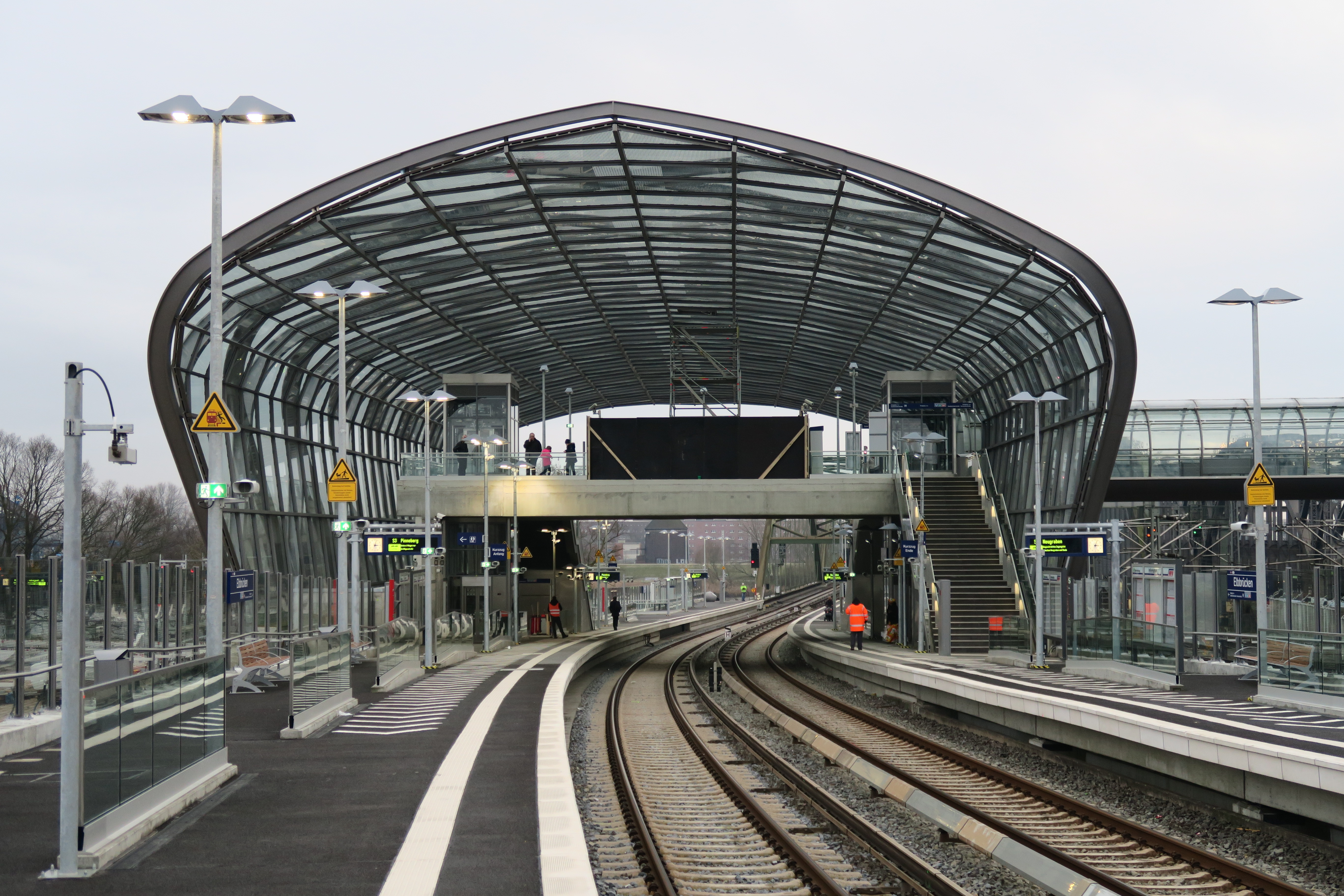 S-Bahnhof Elbbrücken: überdachter Bahnsteigabschnitt